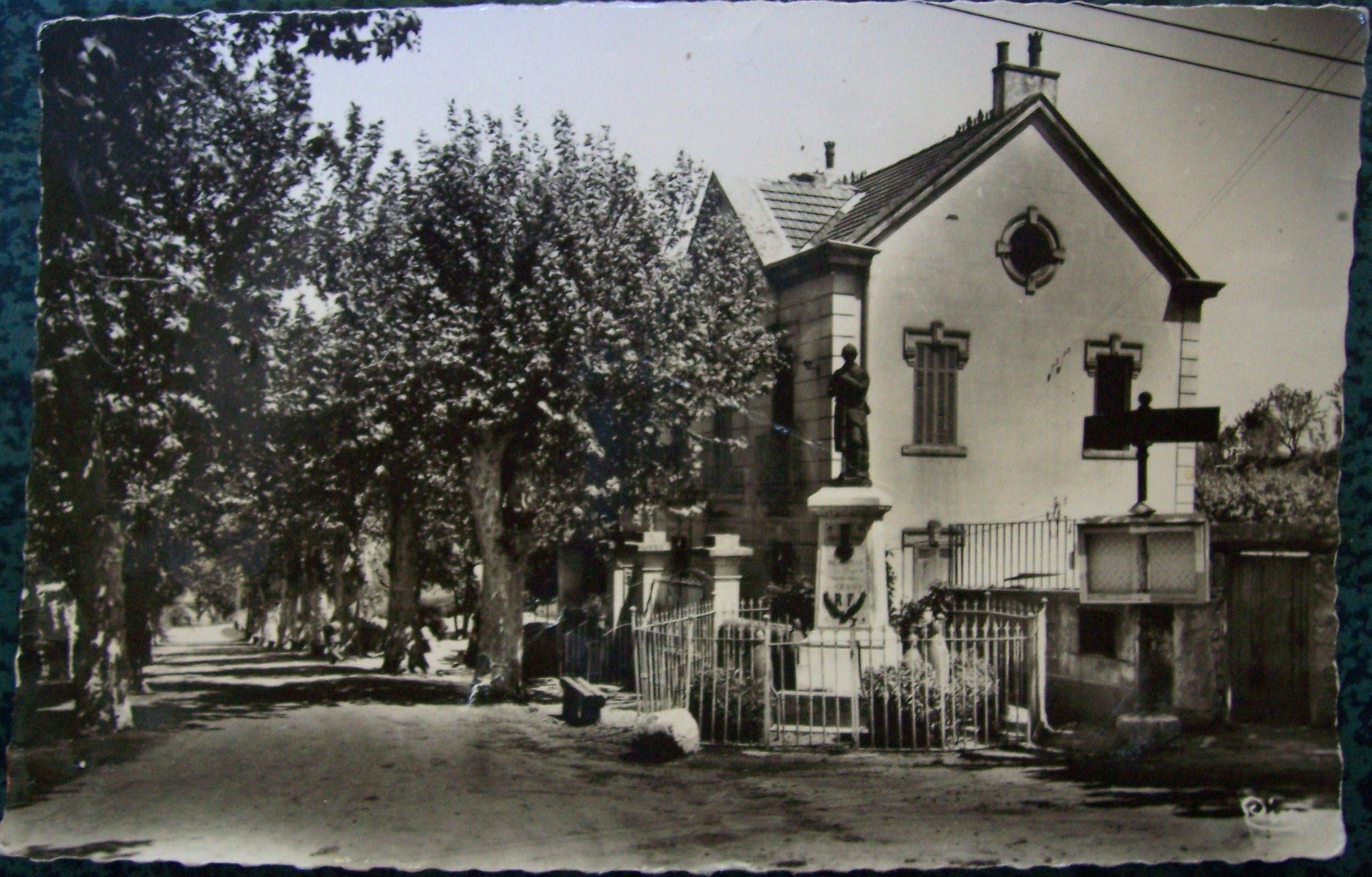 Monument aux morts du village et ancien hôtel-restaurant "Le Châlet" de Beaumont-de-Pertuis